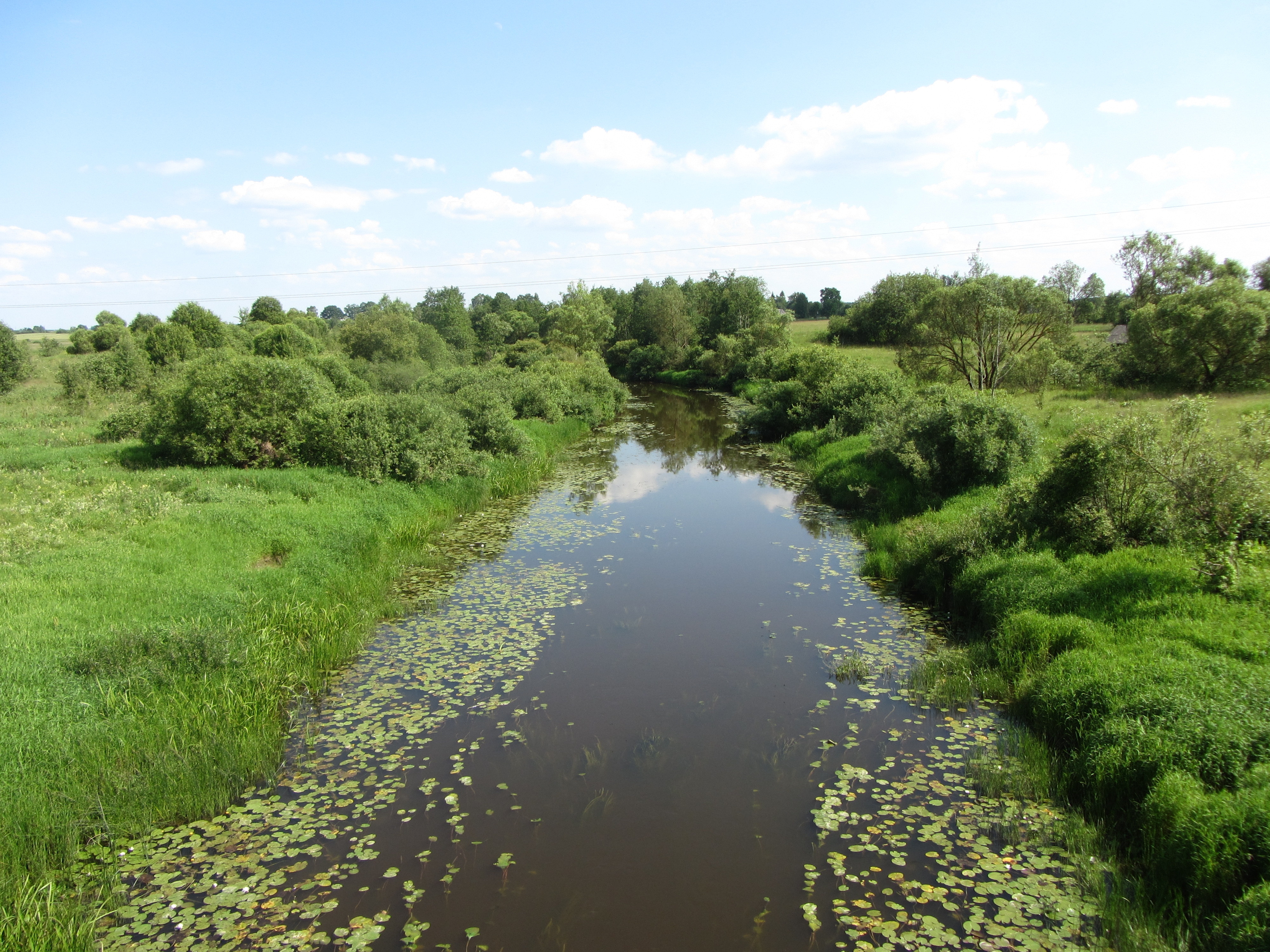 Rimaldiškė, Lithuania